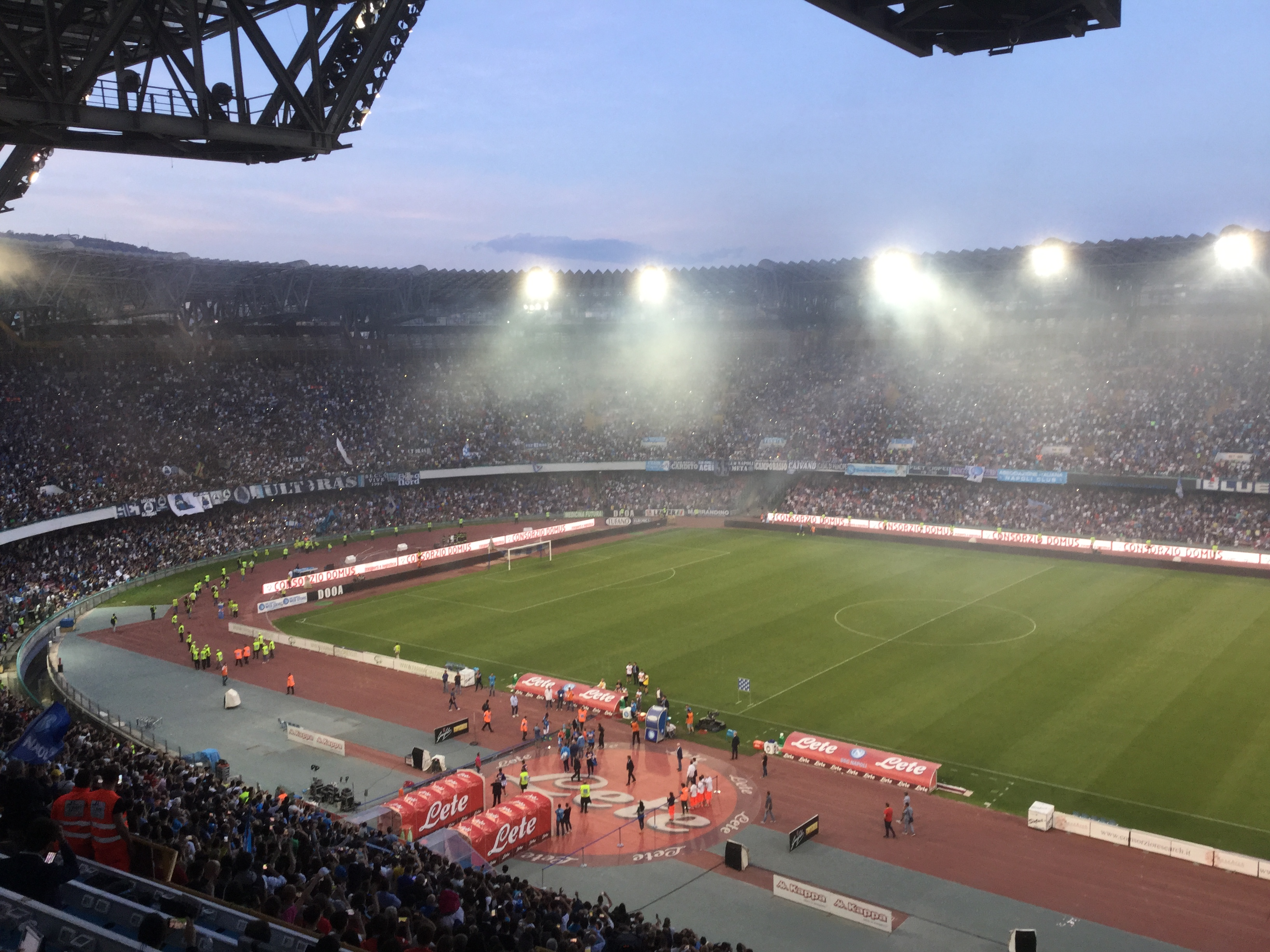 Lo Stadio San Paolo in occasione della partita di Serie A tra Napoli e Crotone, 20 maggio 2018